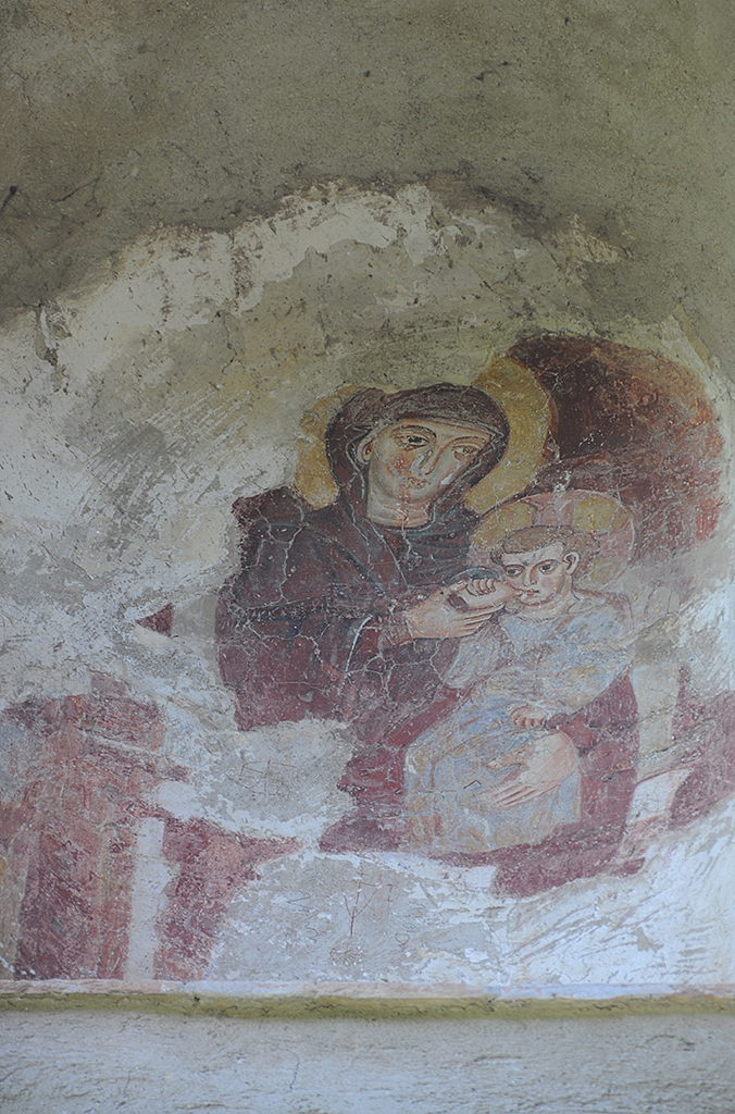 San Giovanni in Argentella - Palombara Sabina